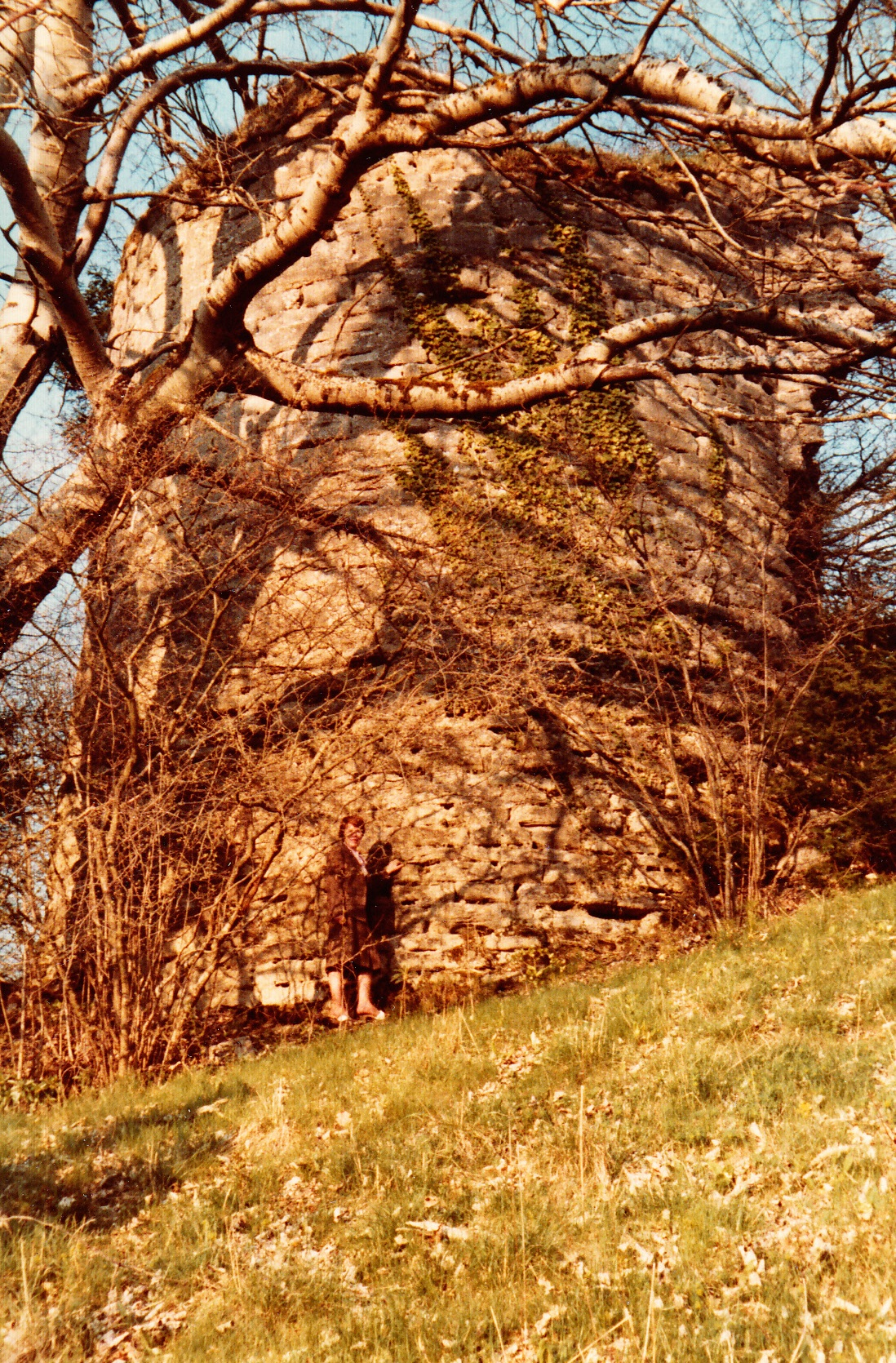 Ruines du château de Crête (XIV° siècle), Versonnex, Haute-Savoie (France), vers 1980